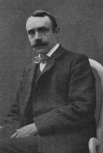 Ruben Liljefors (1871-1936)